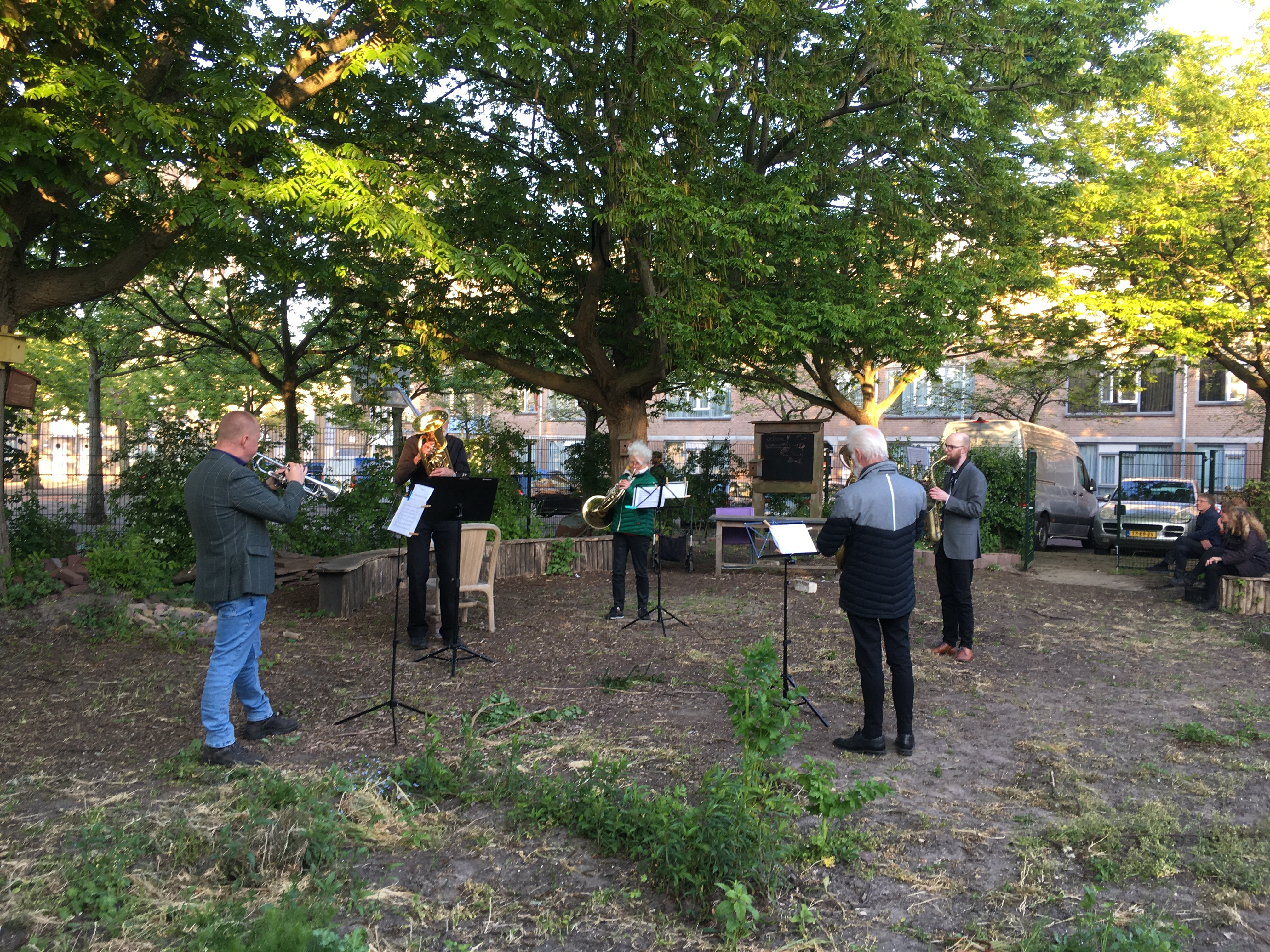 Enkele leden van het KmD orkest (Klein maar Dapper) spelen ter gelegenheid van Dodenherdenking op 4 mei 2020 in de Schilderswijk (waar het orkest in 1916 werd opgericht). Omdat de reguliere herdenkingen werden afgelast of aangepast wegens de maatregelen rondom het Corona-virus, speelde de delegatie de Taptoe, en na de twee minuten stilte het Wilhelmus en enkele koralen in buurttuin De Groene Mus, voor de buurtbewoners.